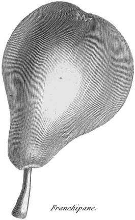 Rozier. Cours d'agriculture, tome 8, planche 16, franchipane (poire)